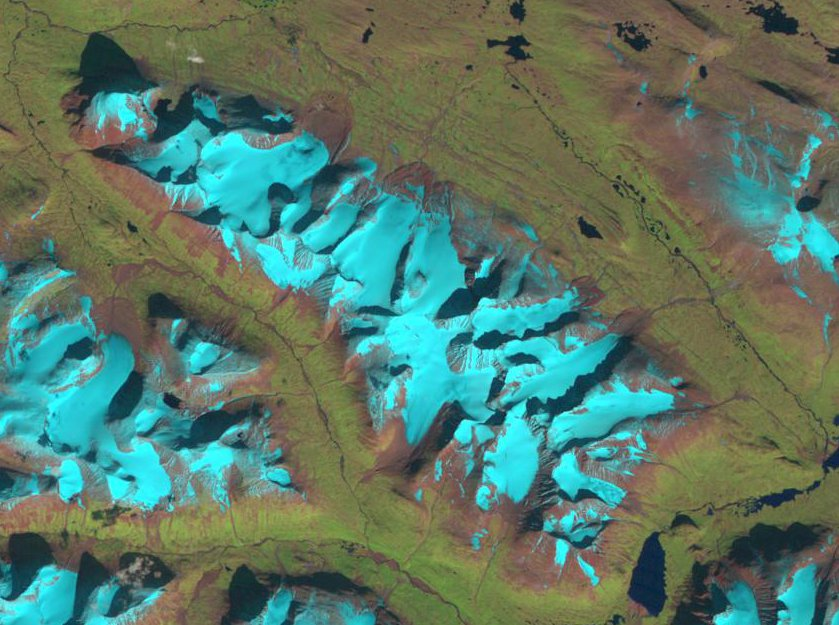 Photo Landsat du 3 septembre 1994 du massif du Sarektjåkkå (point culminant : Stortoppen, 2 089 m).